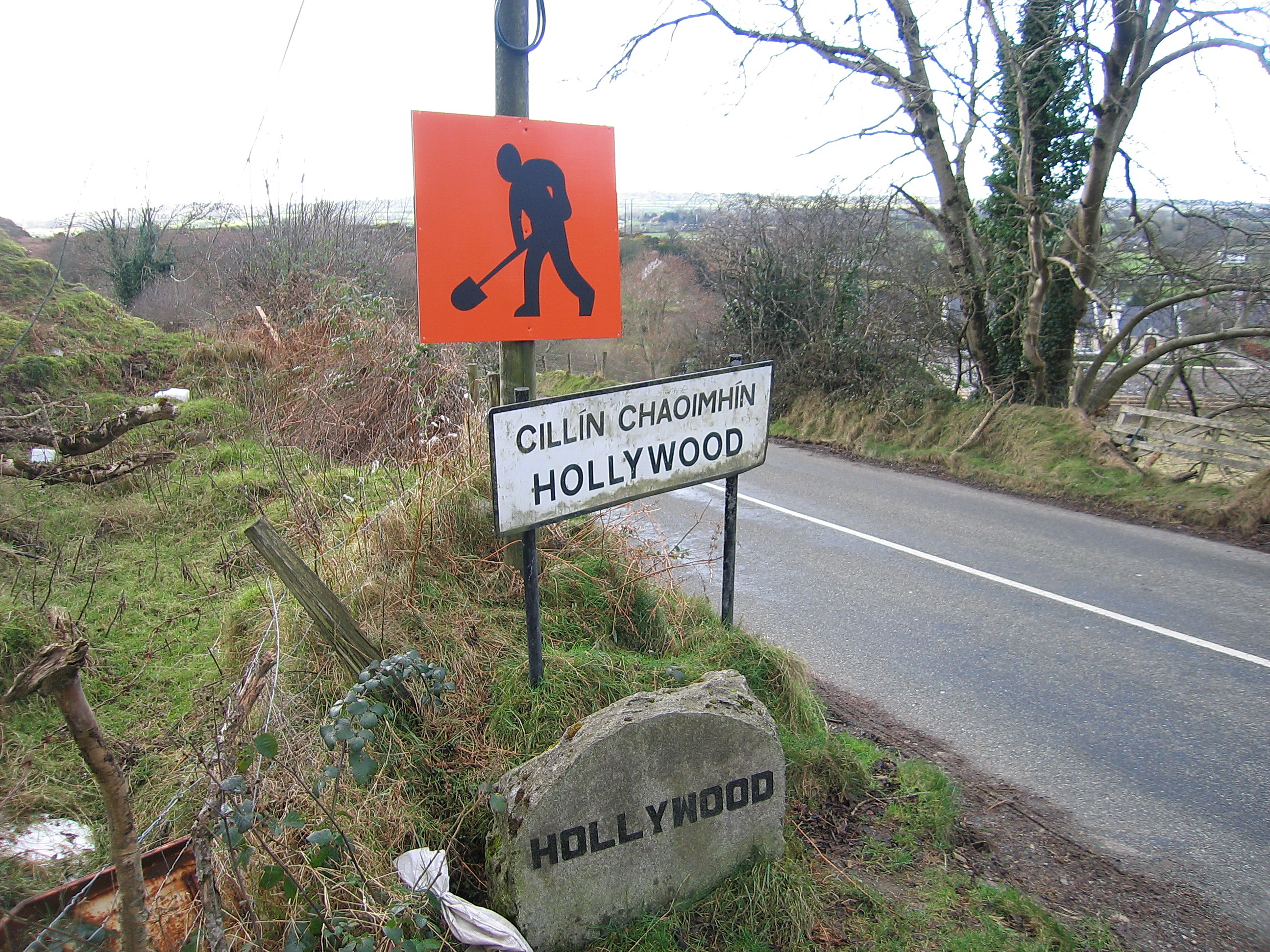 "Hollywood".